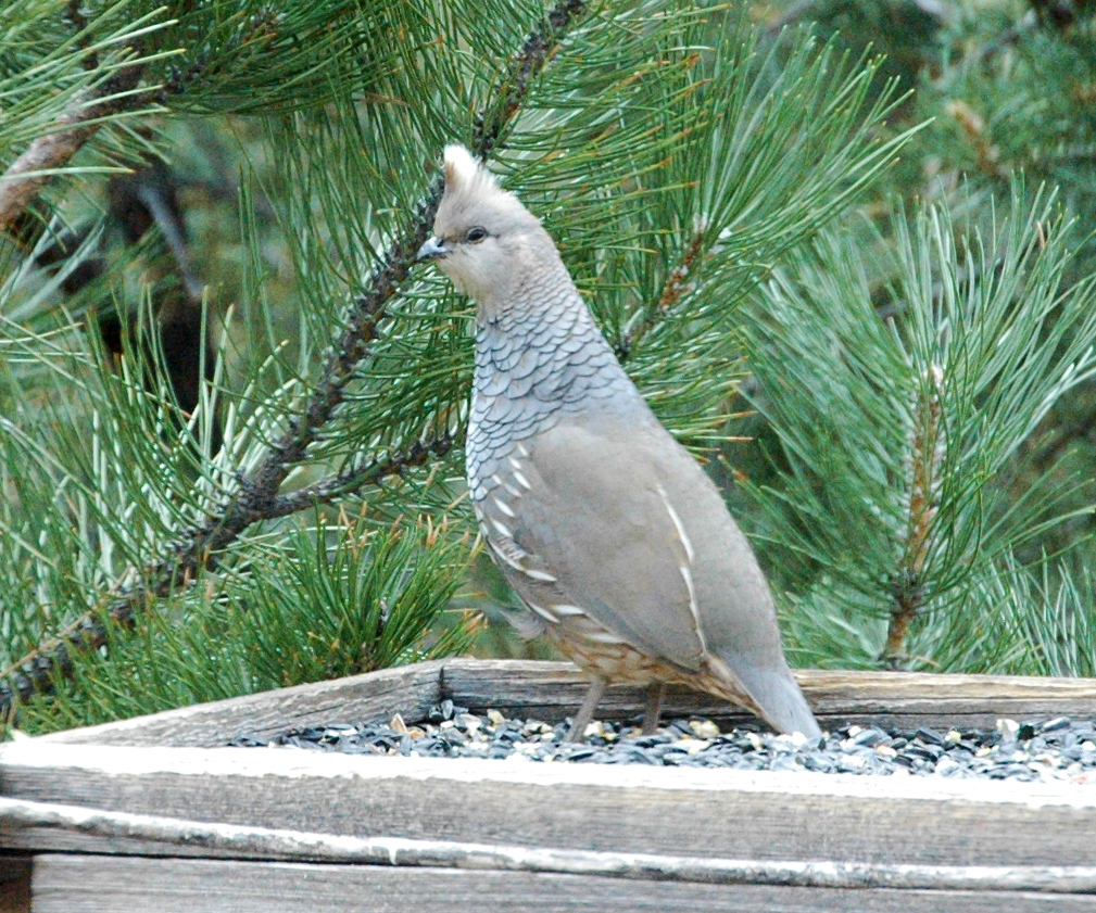 Callipepla squamata on bird table, Santa Fe, New Mexico, USA.